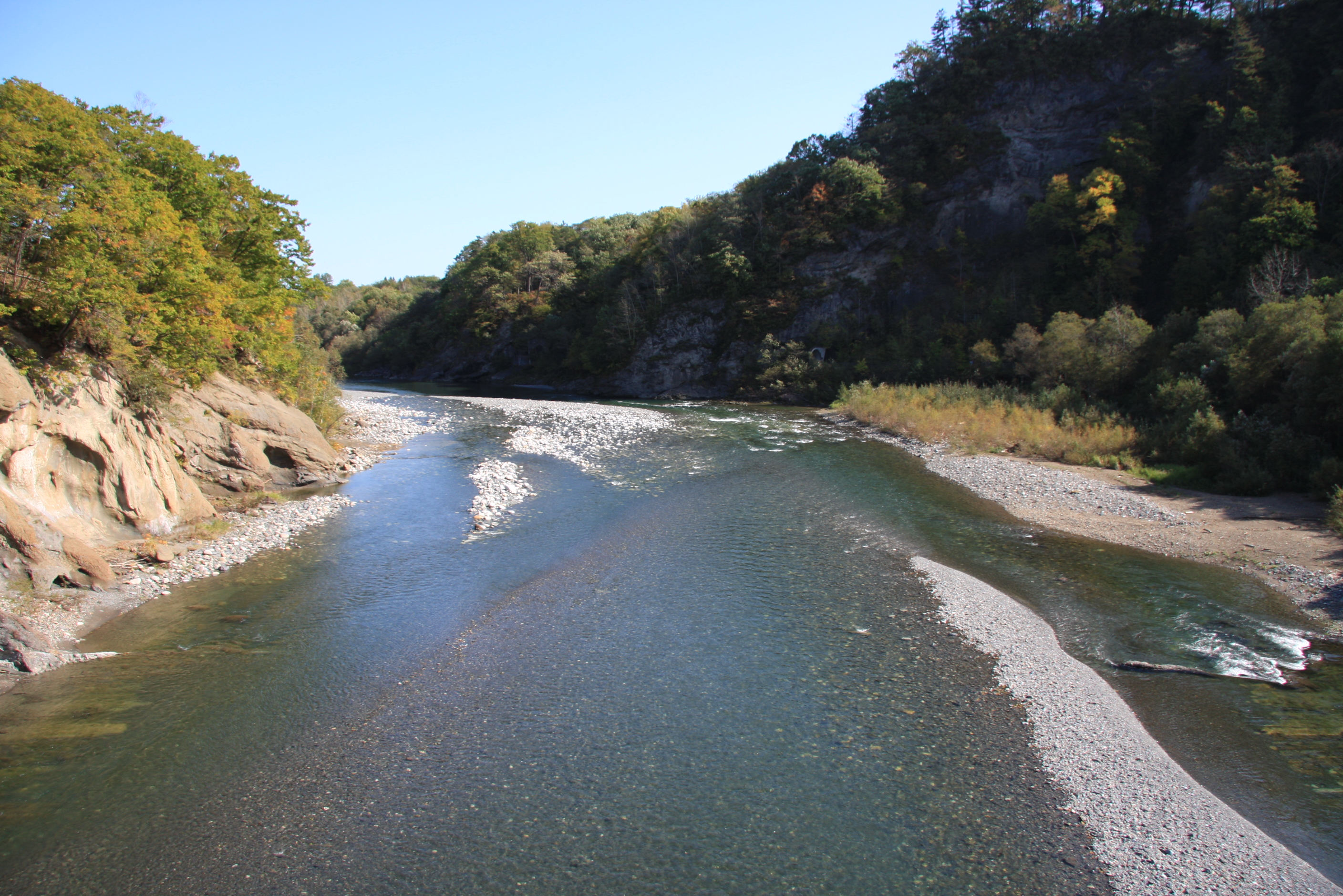 歴舟川 尾田橋より下流側